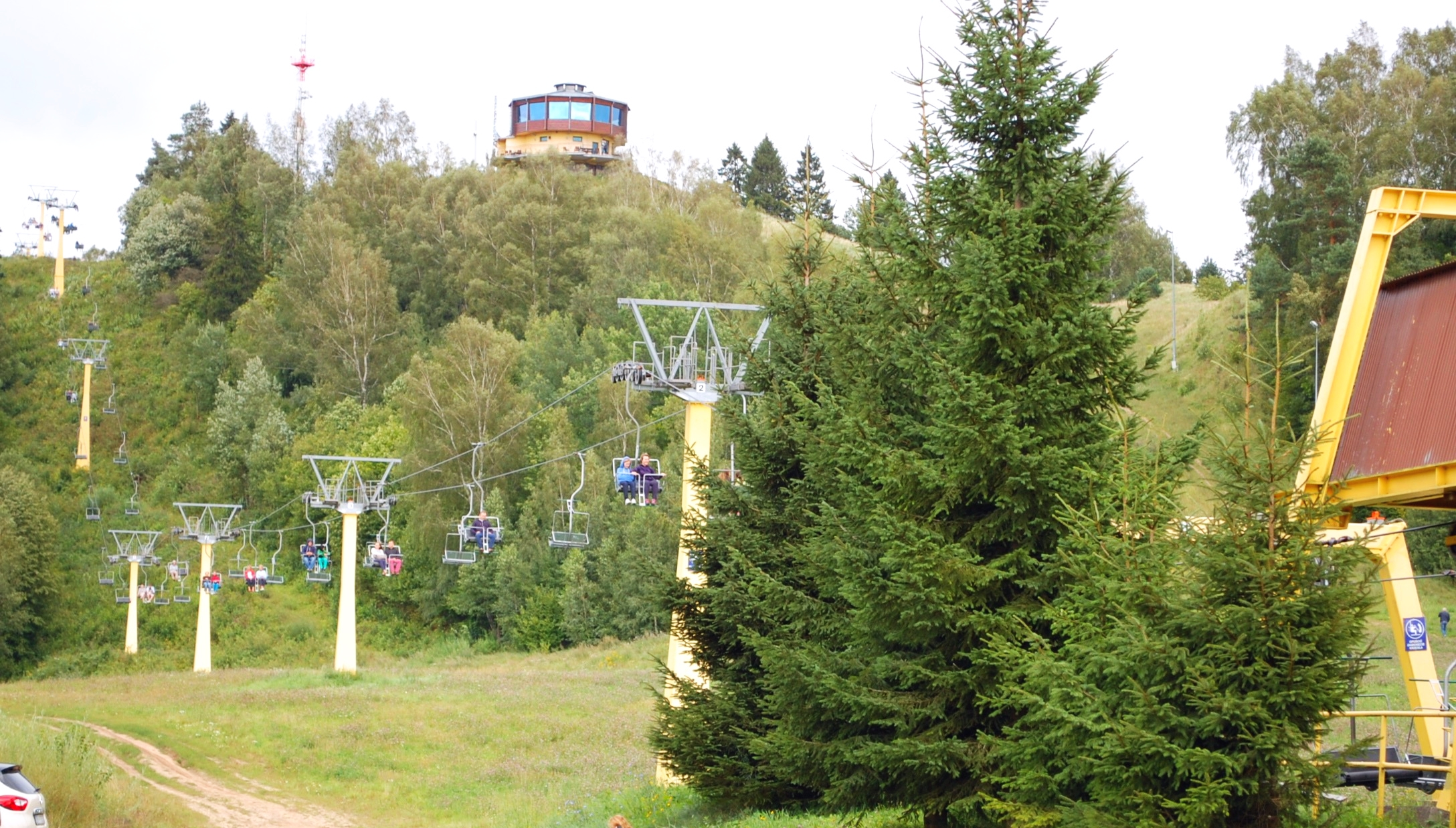 Ośrodek narciarski Piękna Góra